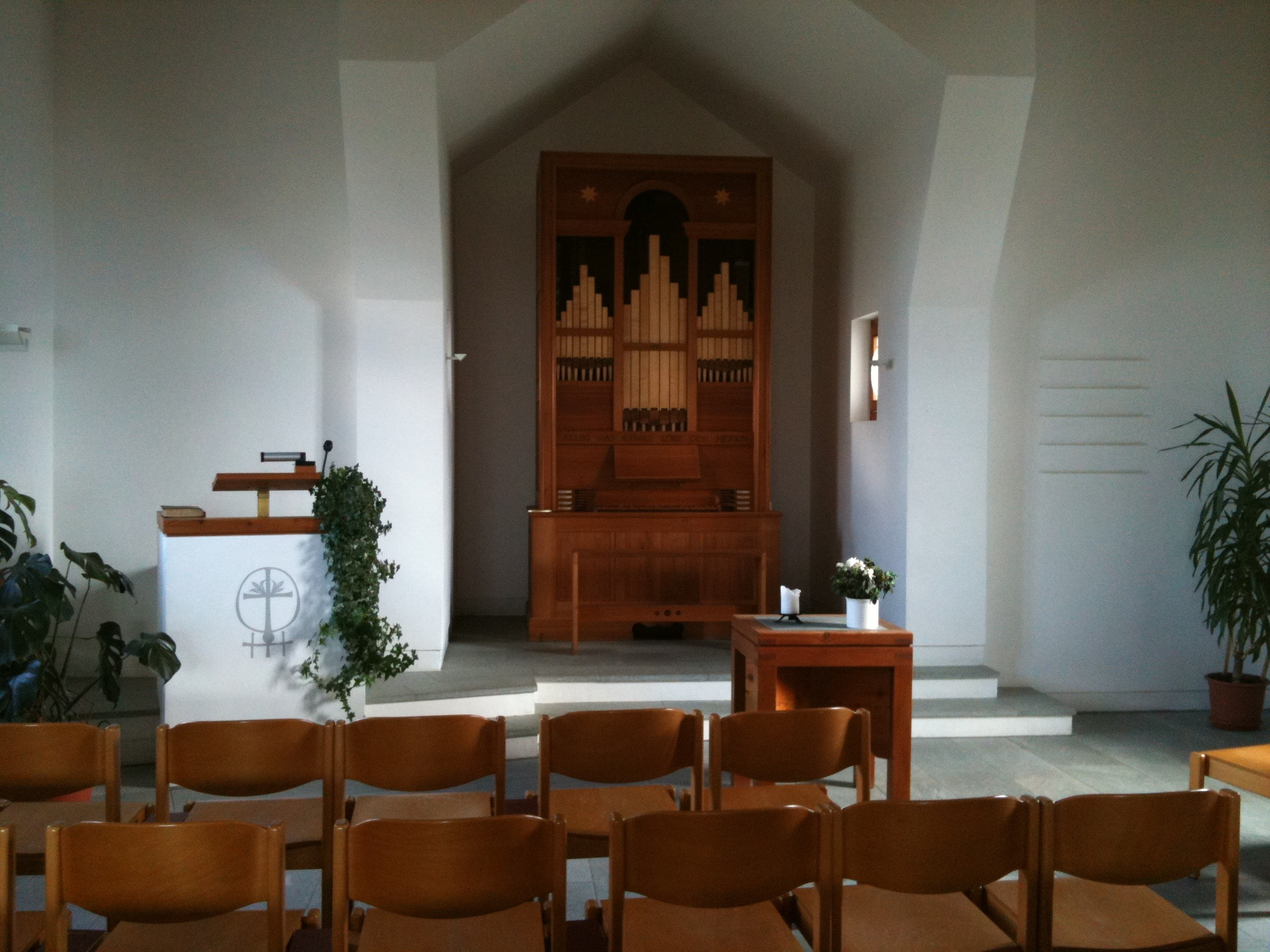 reformierte Kirche Says, Kanton Graubünden